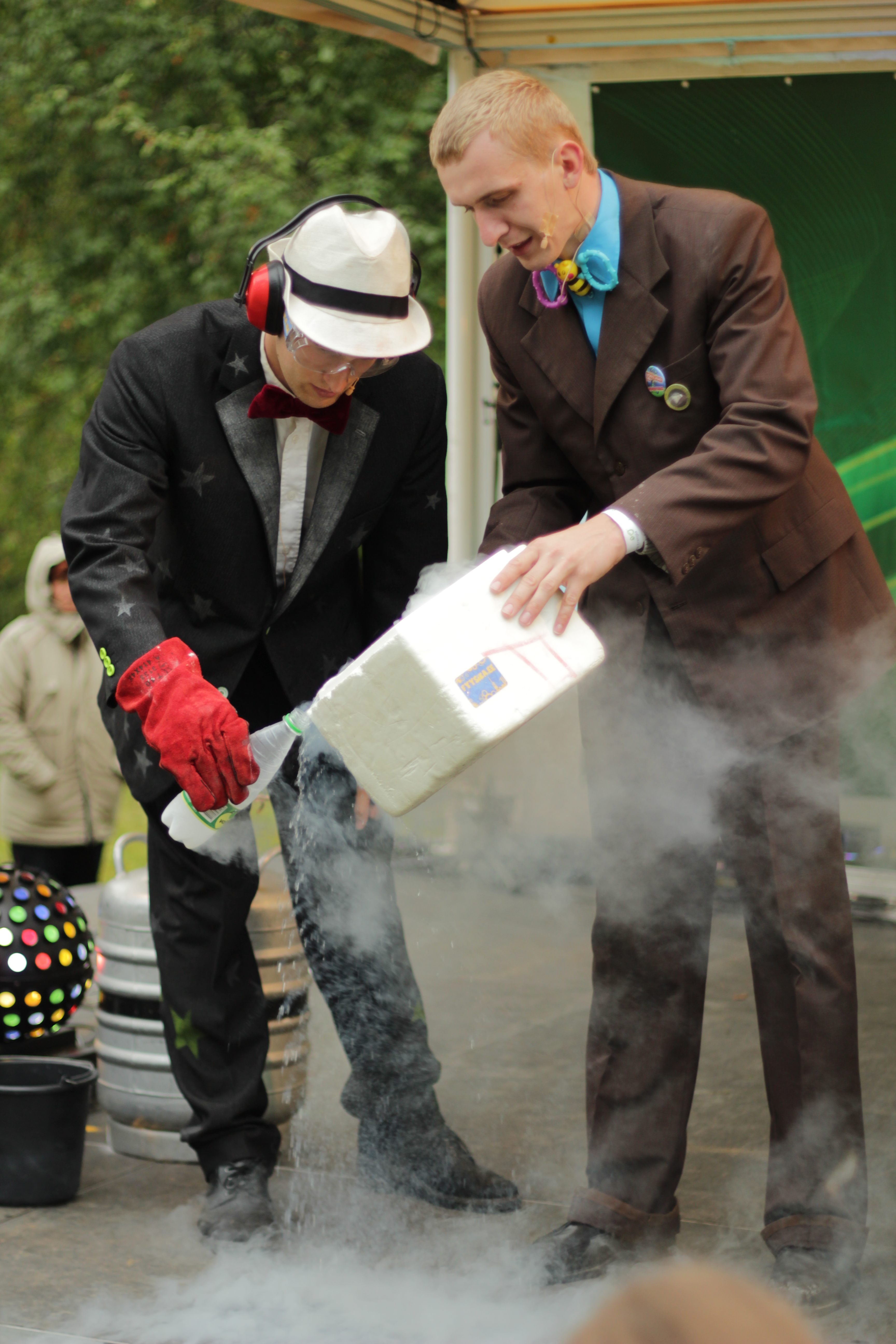 Teadusteatri tegijad Aigar Vaigu ja Andres Juur korraldamas katset vedela lämmastikuga.